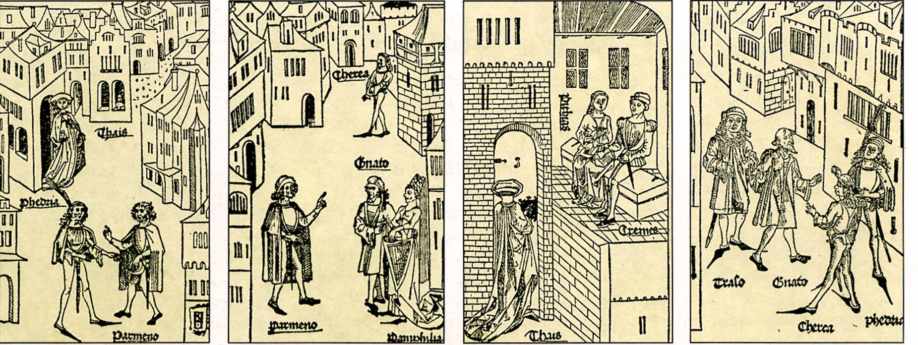 Historische Darstellung, Holzschnitt um 1496. Bühnenbildteile Baseler-Terenz-Ausgabe